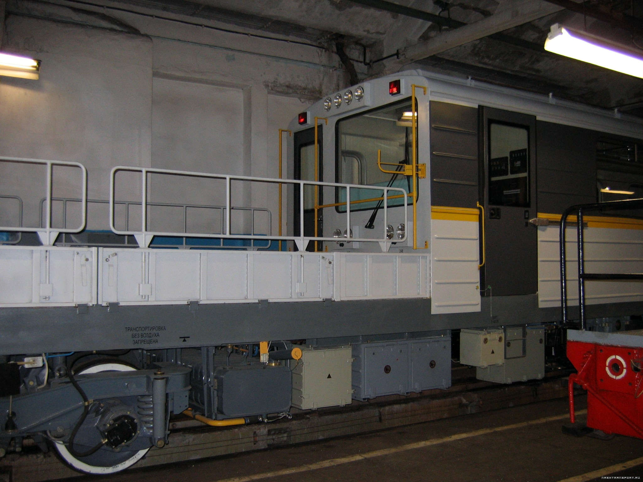 Грузопассажирская автомотриса с краном модели 81-730.05. Построена в 2008 году для линии Д6 (метро-2)